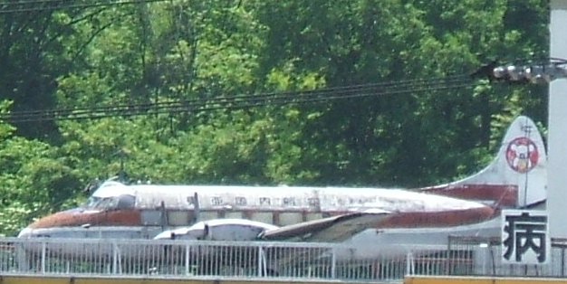 De Havilland 114 Tawron JA6162（広島県府中市上下町の中元クリーニング工場の屋上に保存）本来はDe Havilland 114 Heronであるがエンジン交換の際に名称変更。日本国内のみで運用。尾翼のマークがクリーニング会社のものになっているが、そのほかは現役当時のままである。